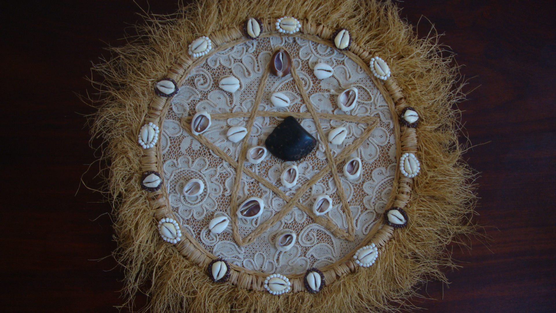 Odu Obará, Merindilogun, Candomblé, Salvador, Bahia, Brasil